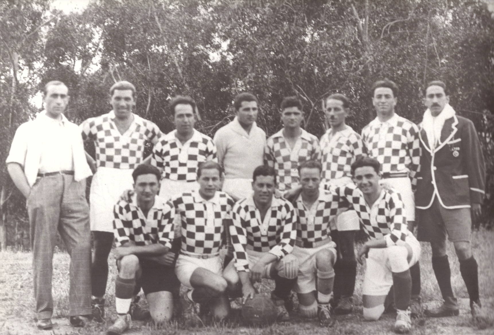 Photo de l'equipe Avant Garde de Tunis 1930/31